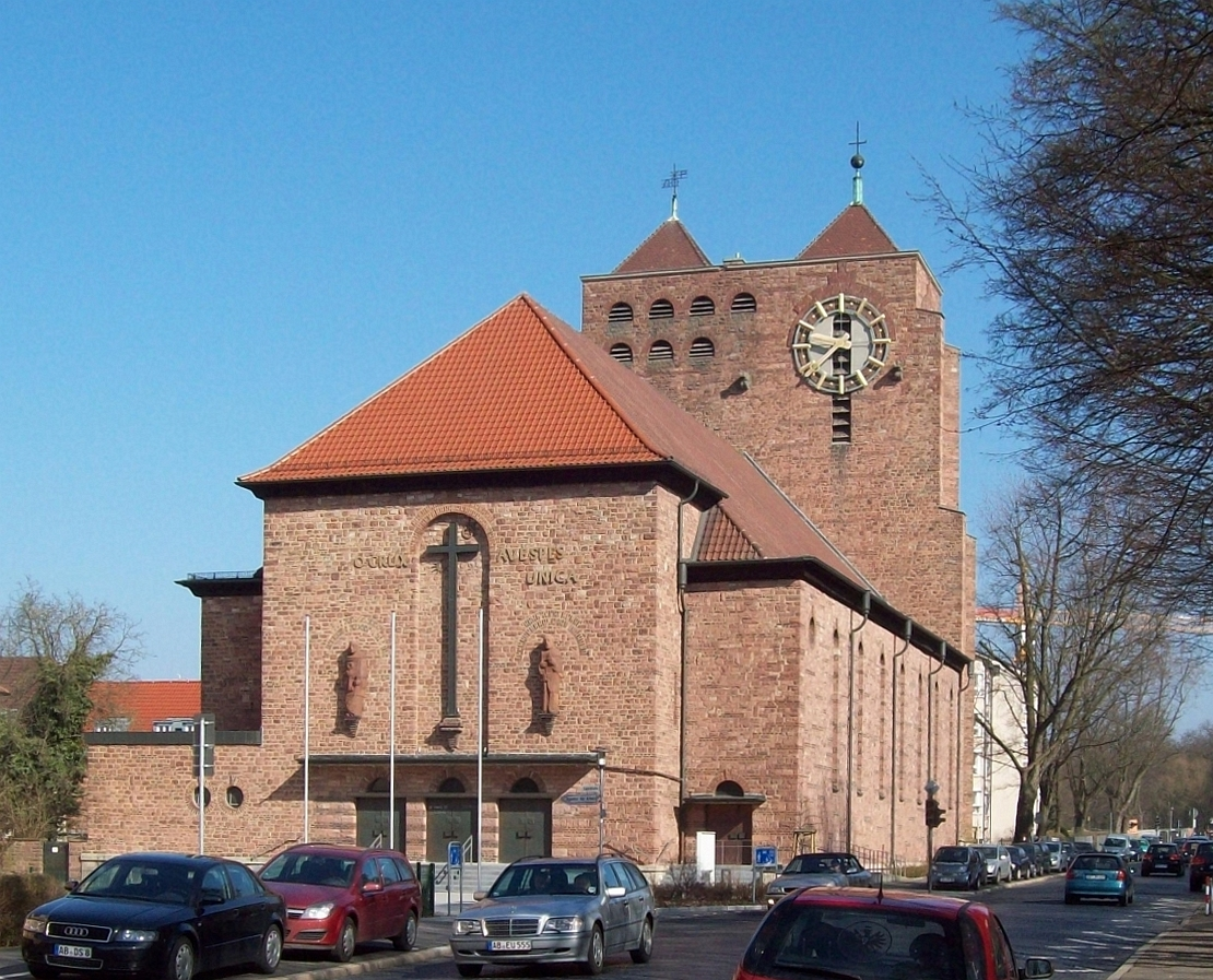 Herz Jesu Kirche Aschaffenburg (Außenansicht Westseite Eingang)